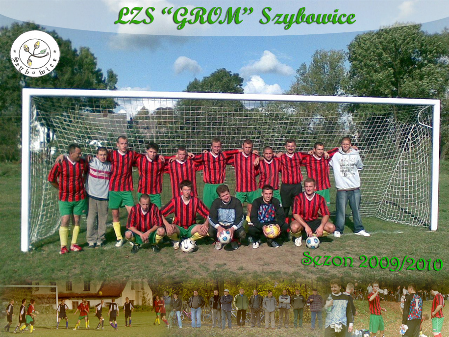 Drużyna LZS "GROM" Szybowice - seniorzy sezon 2009/2010